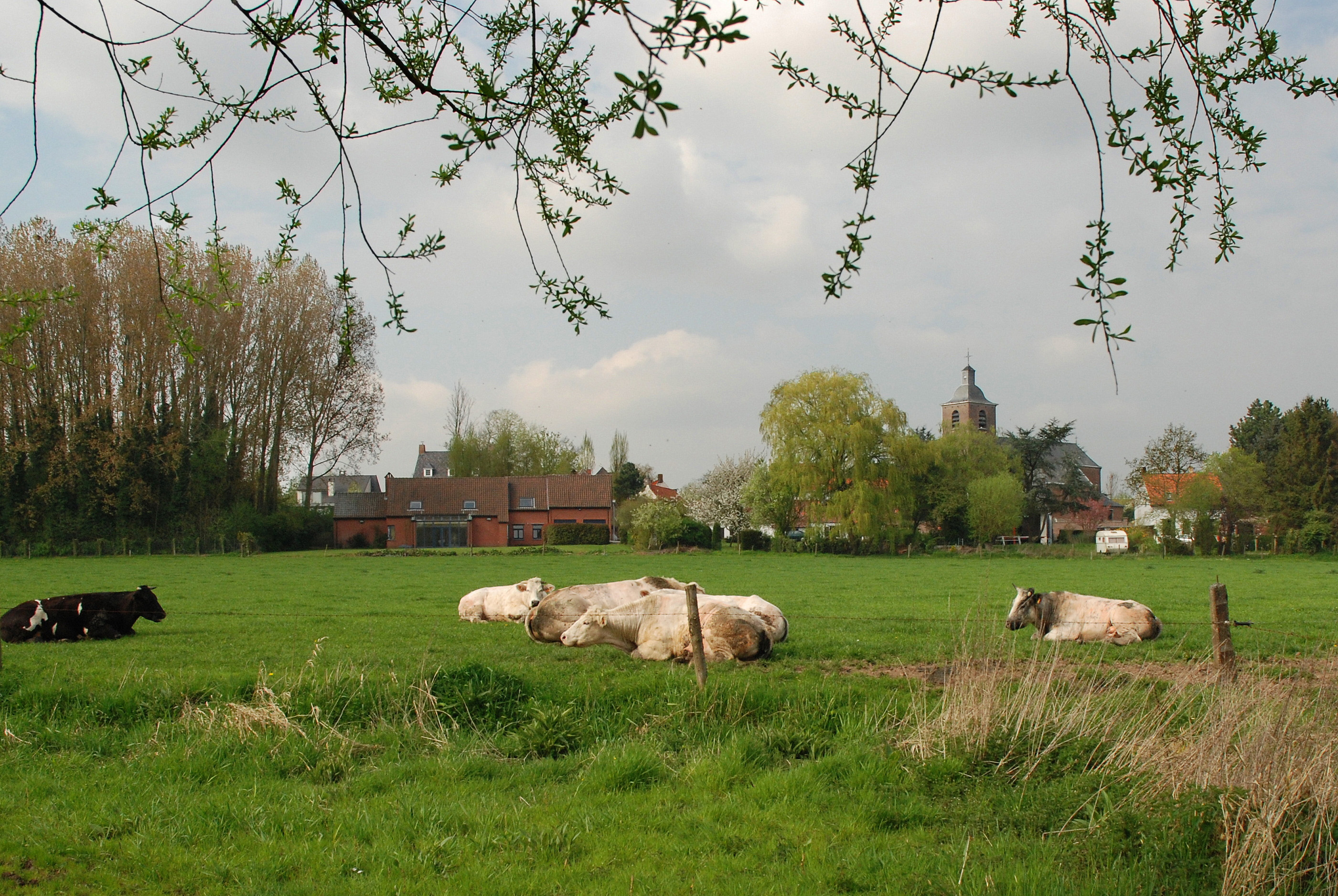 Lede, dorp in de deelgemeente Wannegem-Lede, België